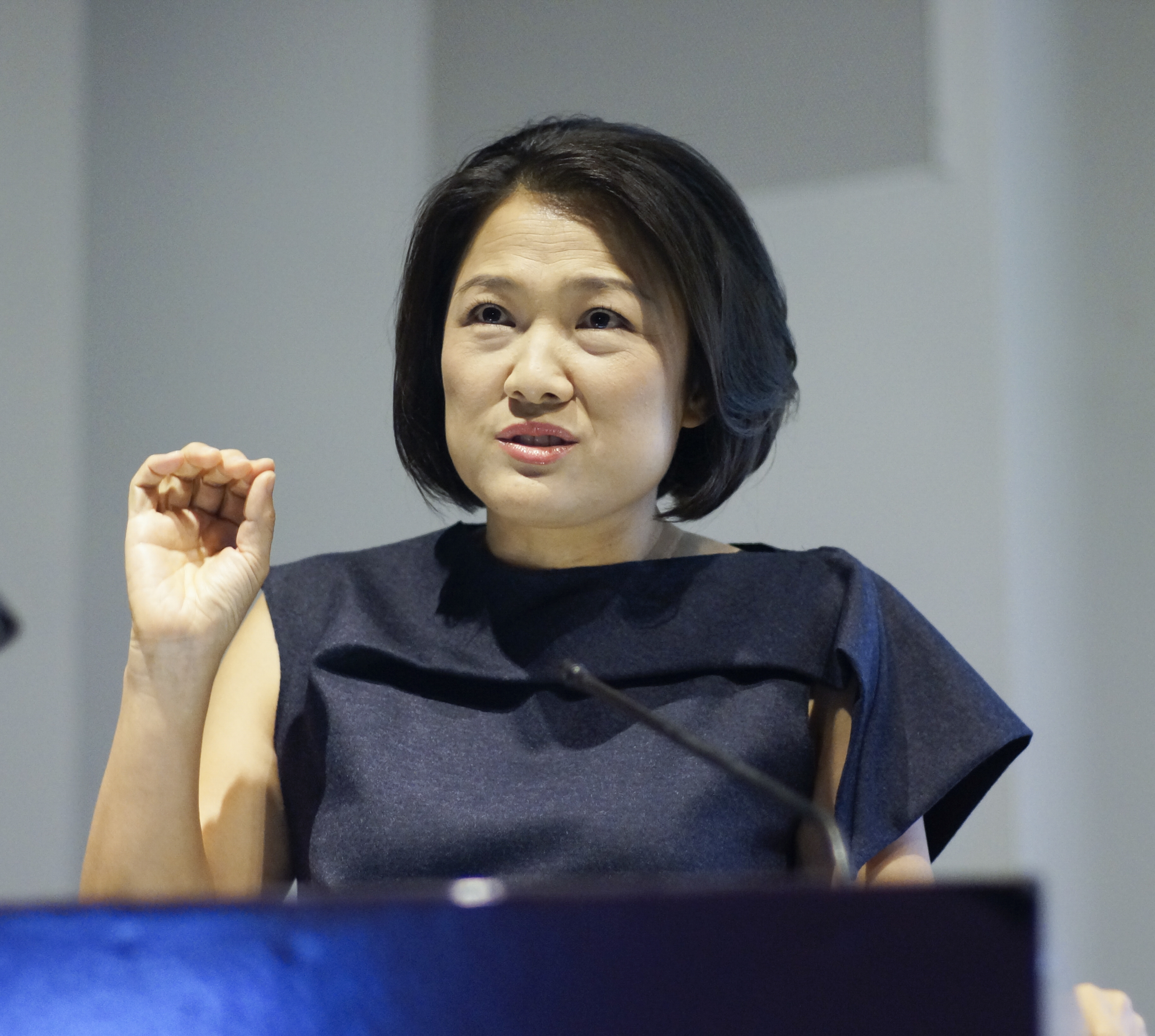 Das Foto zeigt die chinesische Immobilienunternehmerin Zhang Xin auf einer Veranstaltung von SOHO China 2013.